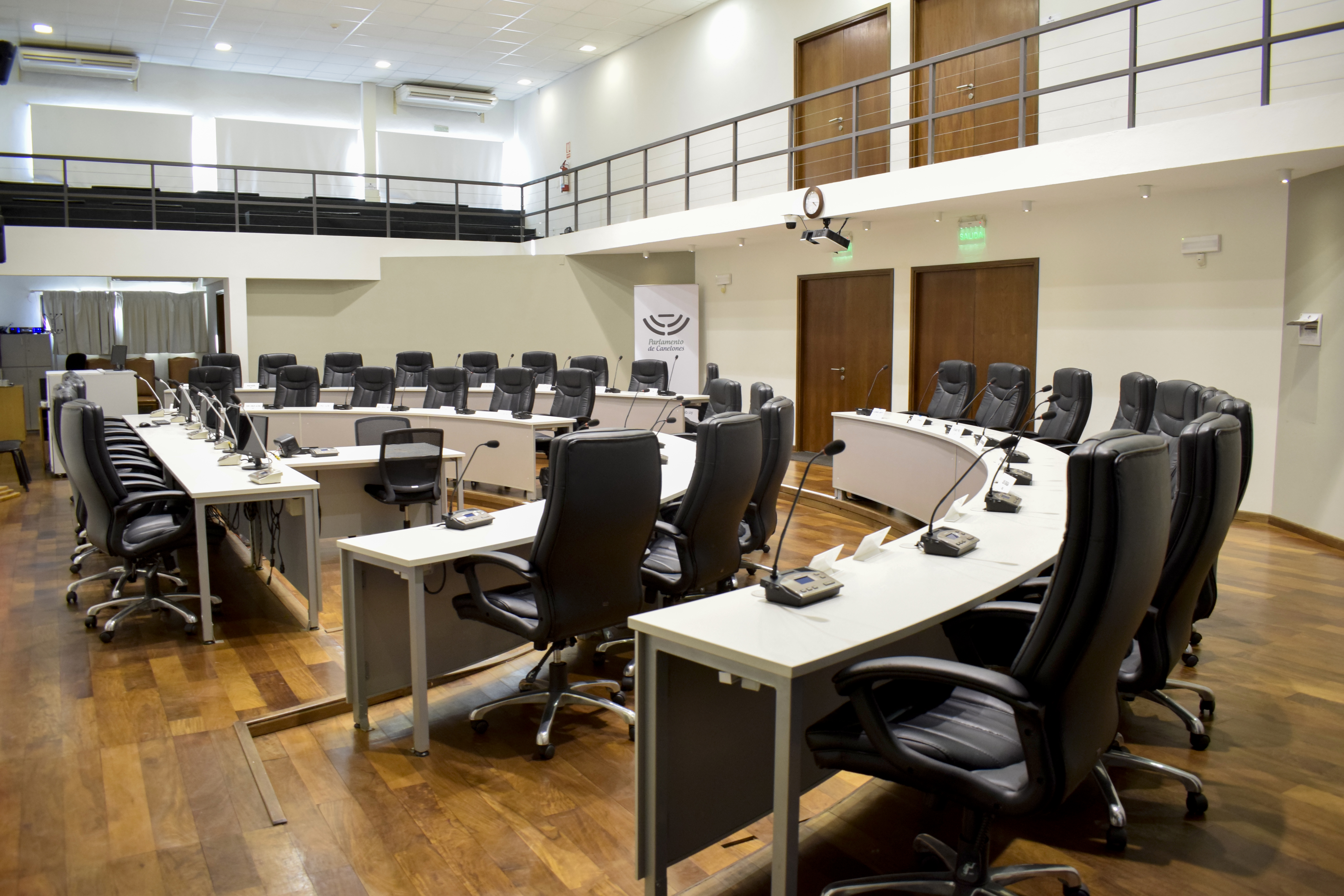 Sala de Sesiones de la Junta Departamental de Canelones